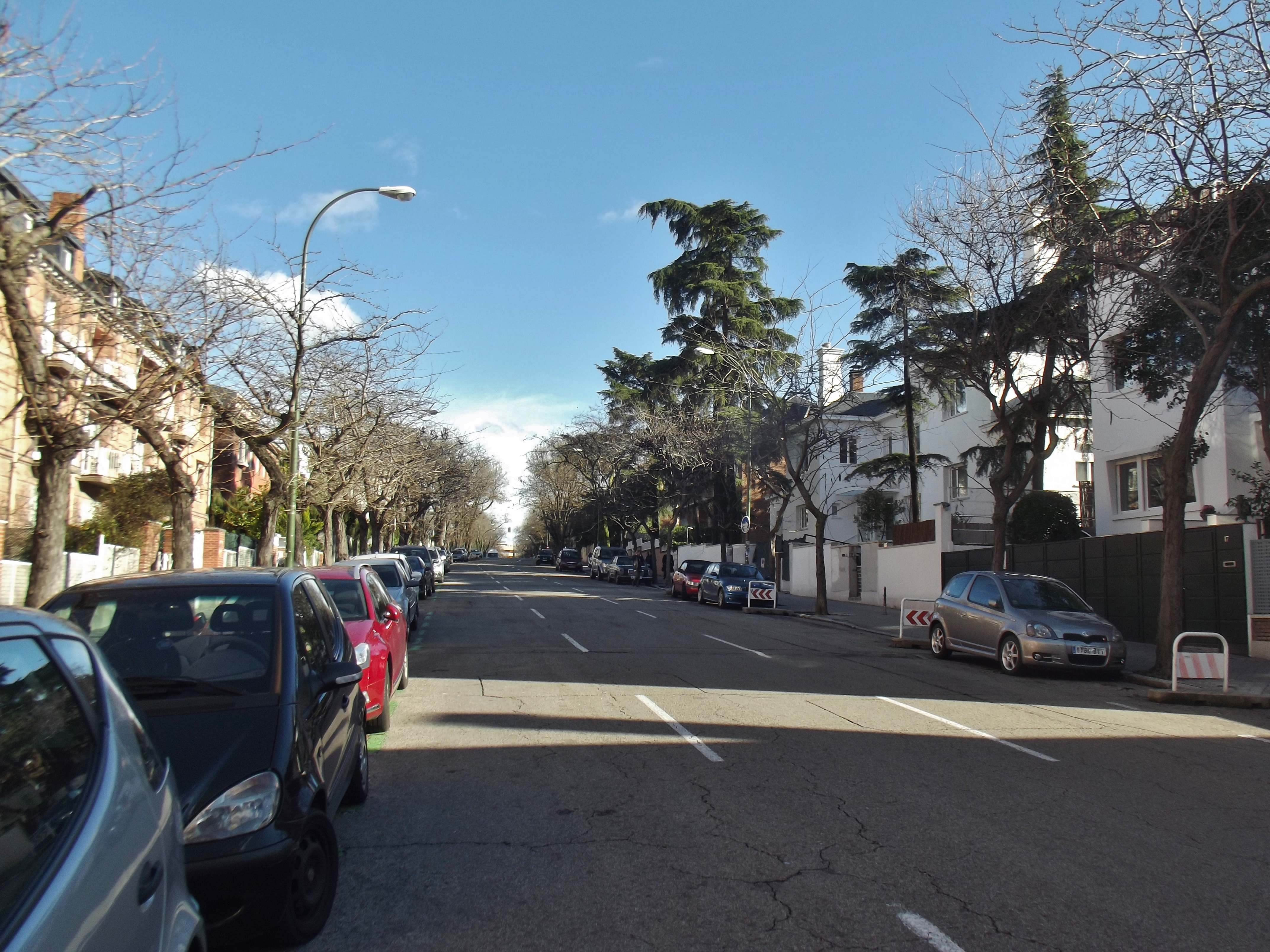 Calle del Segre, Madrid. This is a retouched picture, which means that it has been digitally altered from its original version. Modifications: Distorted car plates.